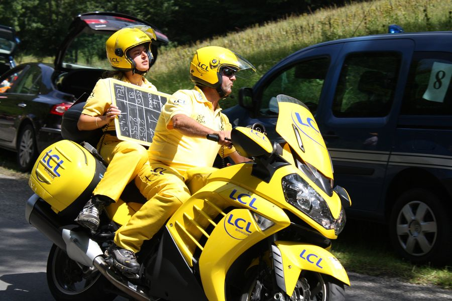 Claire Pedrono, ardoisière du Tour de France 2011, lors de la 14ème étape.